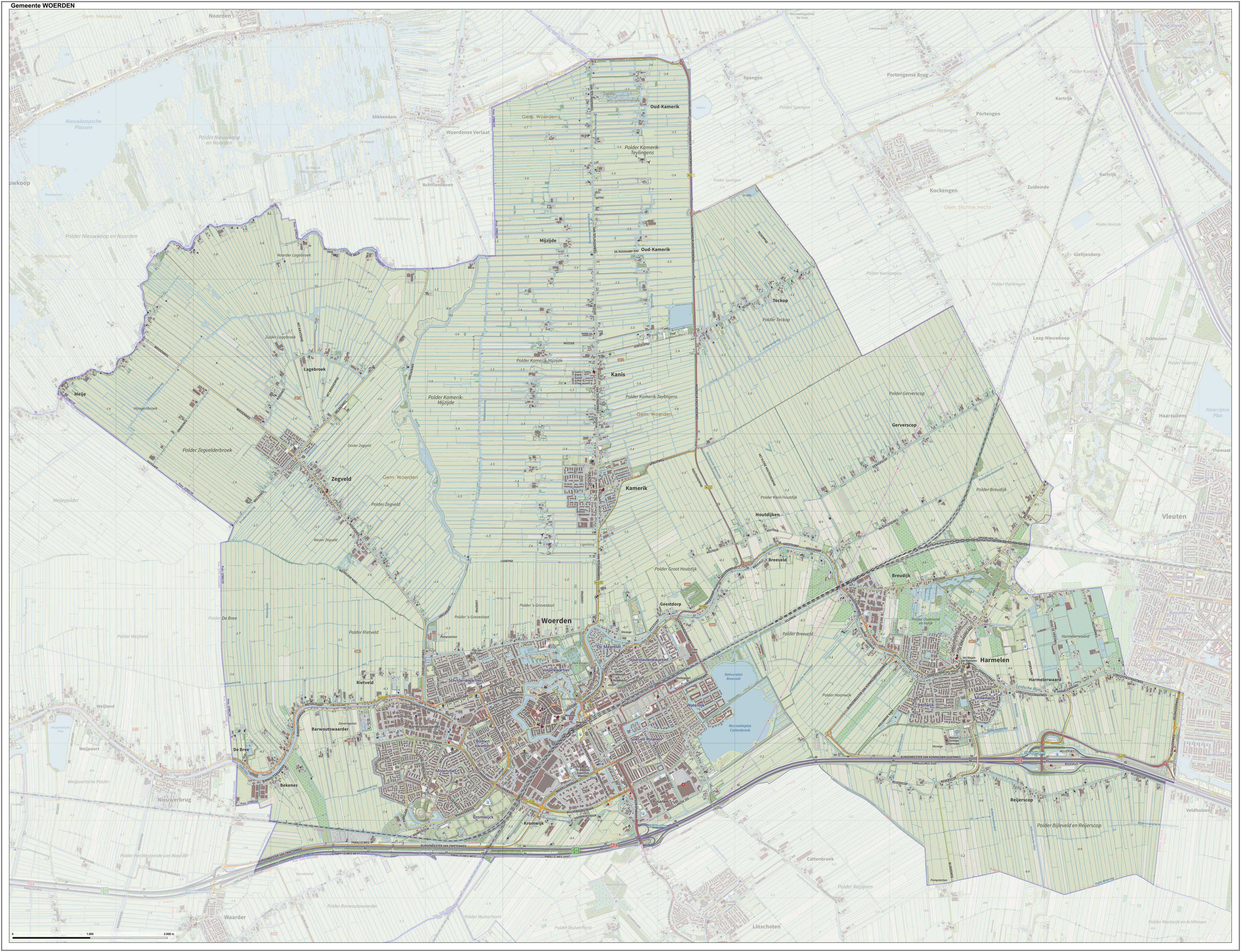 Topografische gemeentekaart. Resolutie: 400 pixels/km. Kaartbeeld samengesteld uit de open geodata van de Top10NL en Top25namen (Kadaster), Creative Commons-BY licentie. Gebouwvlakken uit open geodata BAG extract. Wegen uit de OpenStreetMap, OpenStreetMap community. Reliëfschaduw uit de Actuele Hoogtekaart AHN2. Samenstelling en kleurenschema: Jan-Willem van Aalst, met QGIS. Zie ook de Legenda.